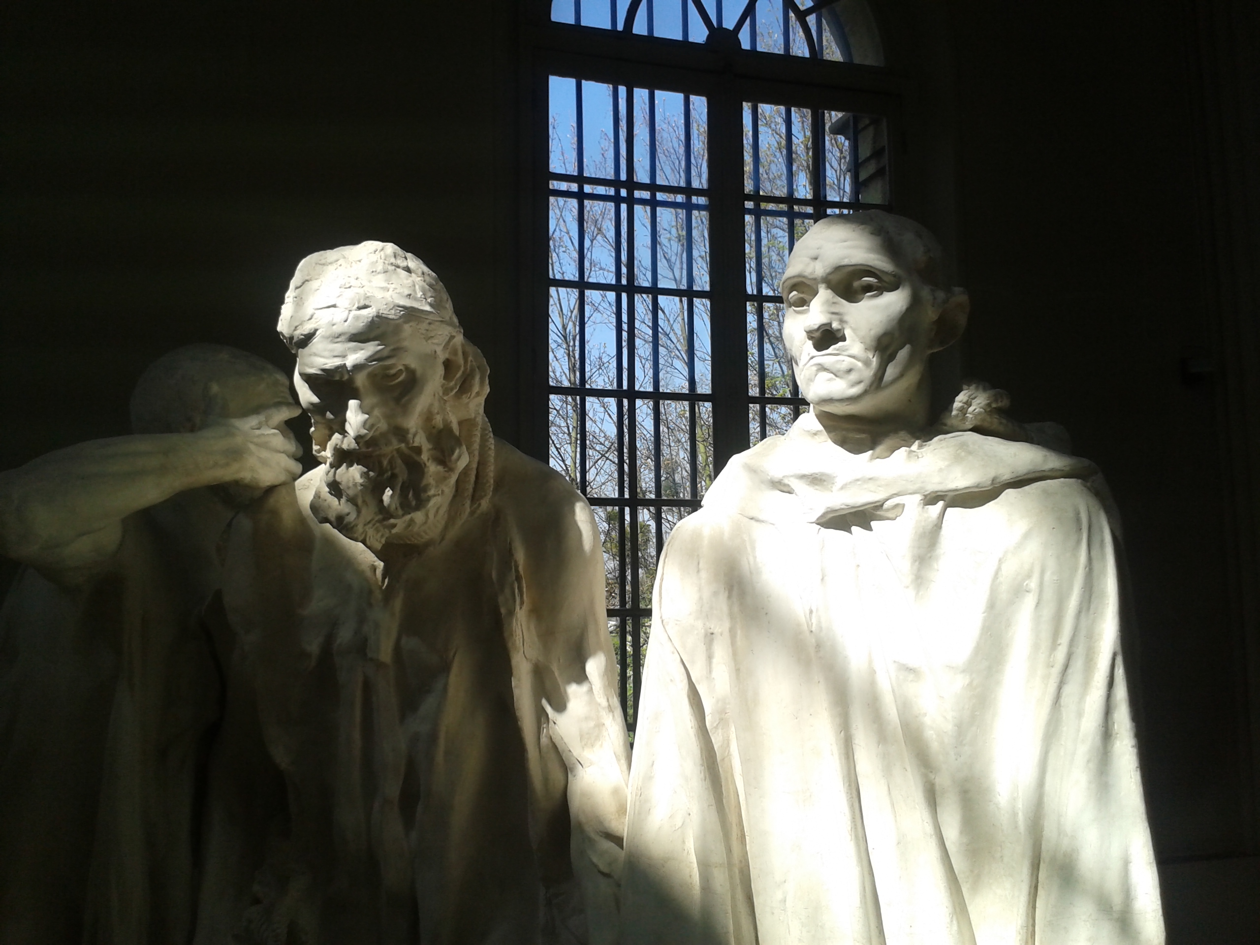 Détail des Bourgeois de Calais Eustache de St Pierre et Jean d'Aire. Musée Rodin de Meudon